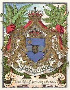 Armes de l'état indépendant du Congo. Image ancienne, domaine public